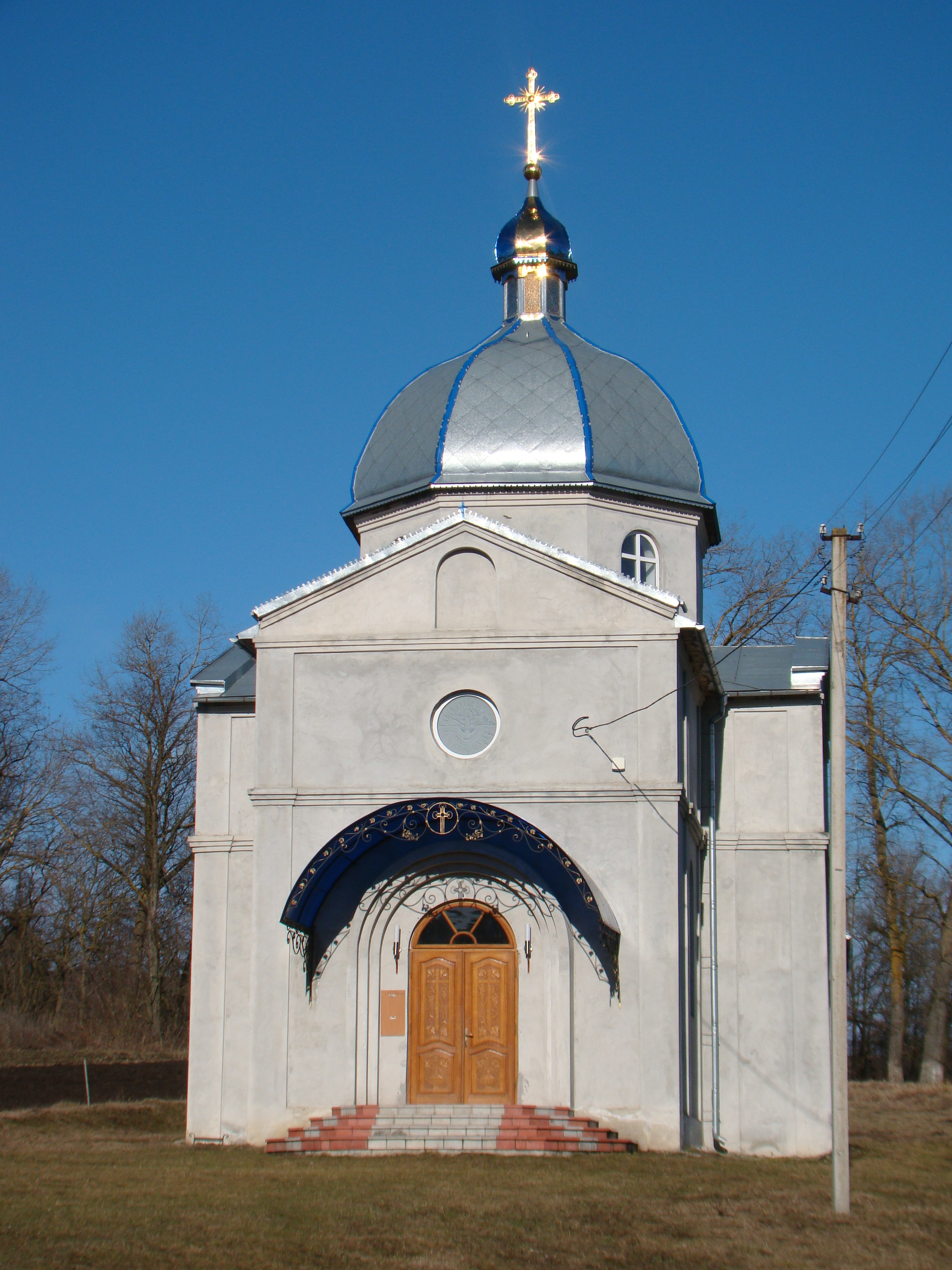 2007 рік